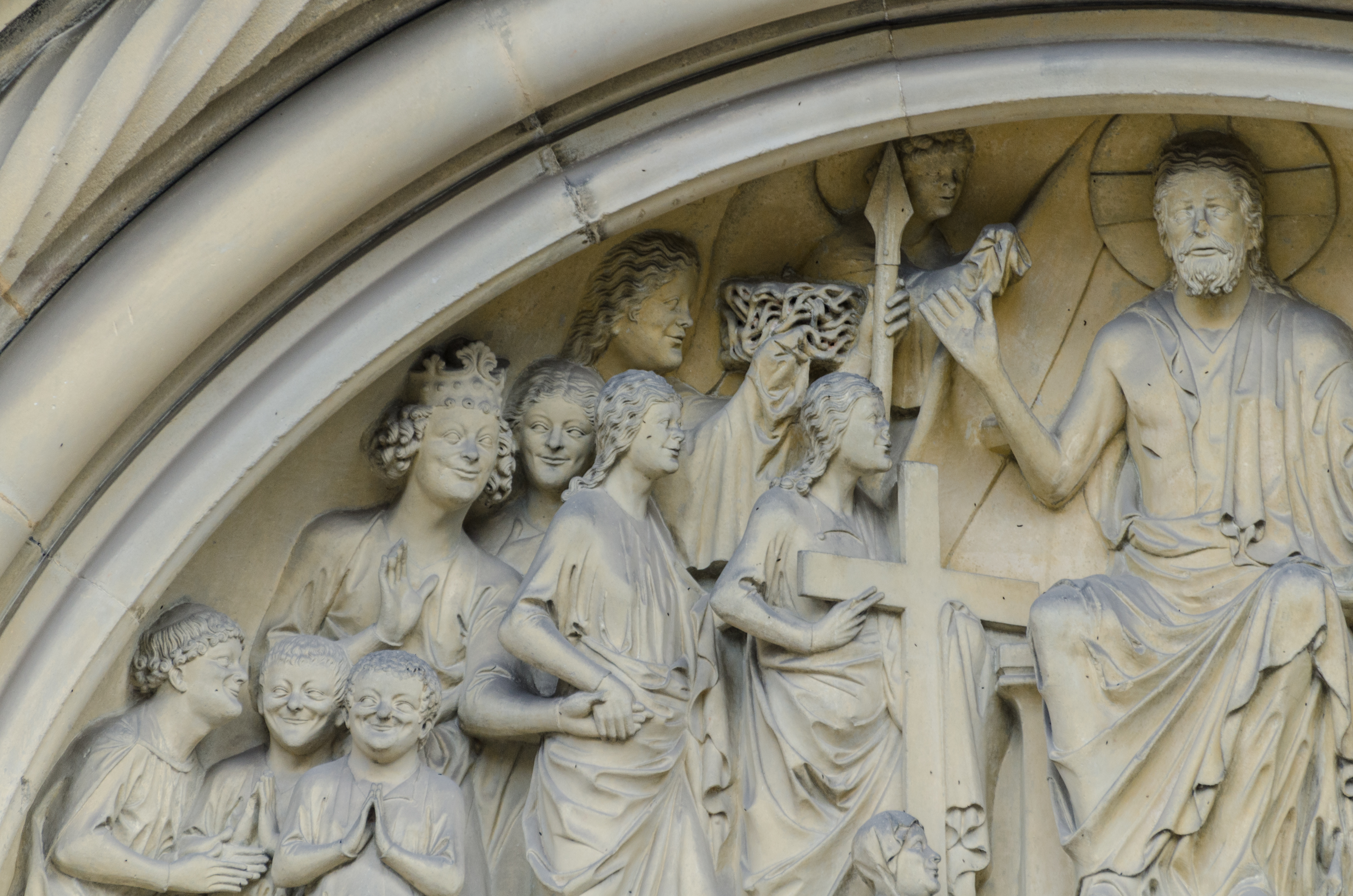 Bamberg, Dom, Fürstenportal, Tympanon